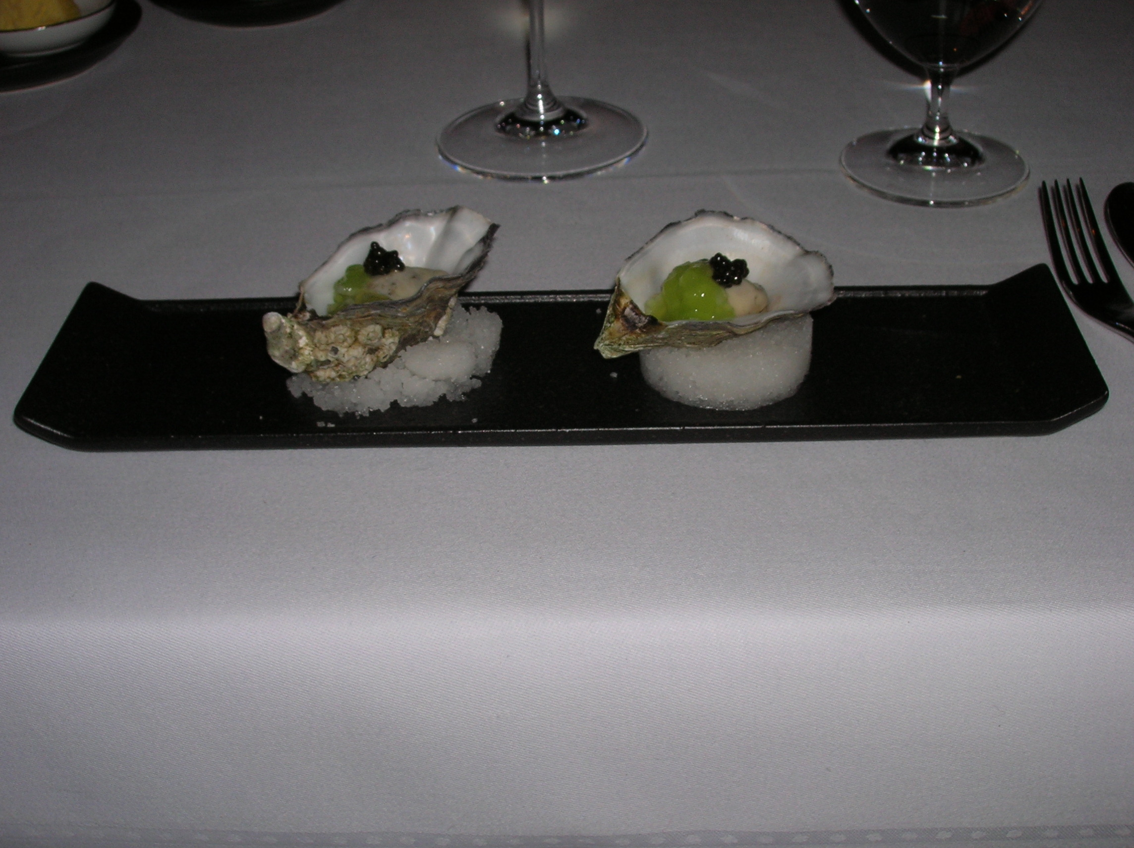 אויסטרים בקפריס